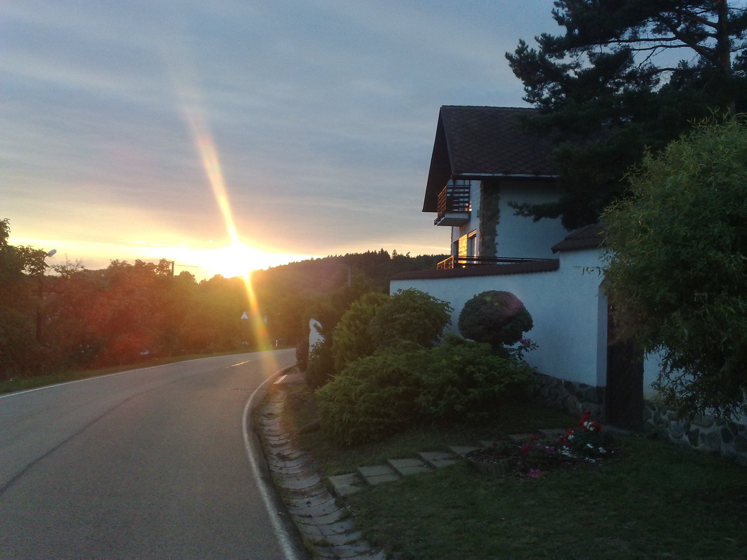 Dům u vjezdu do Újezda. Západ Slunce osvětluje jeho štít.